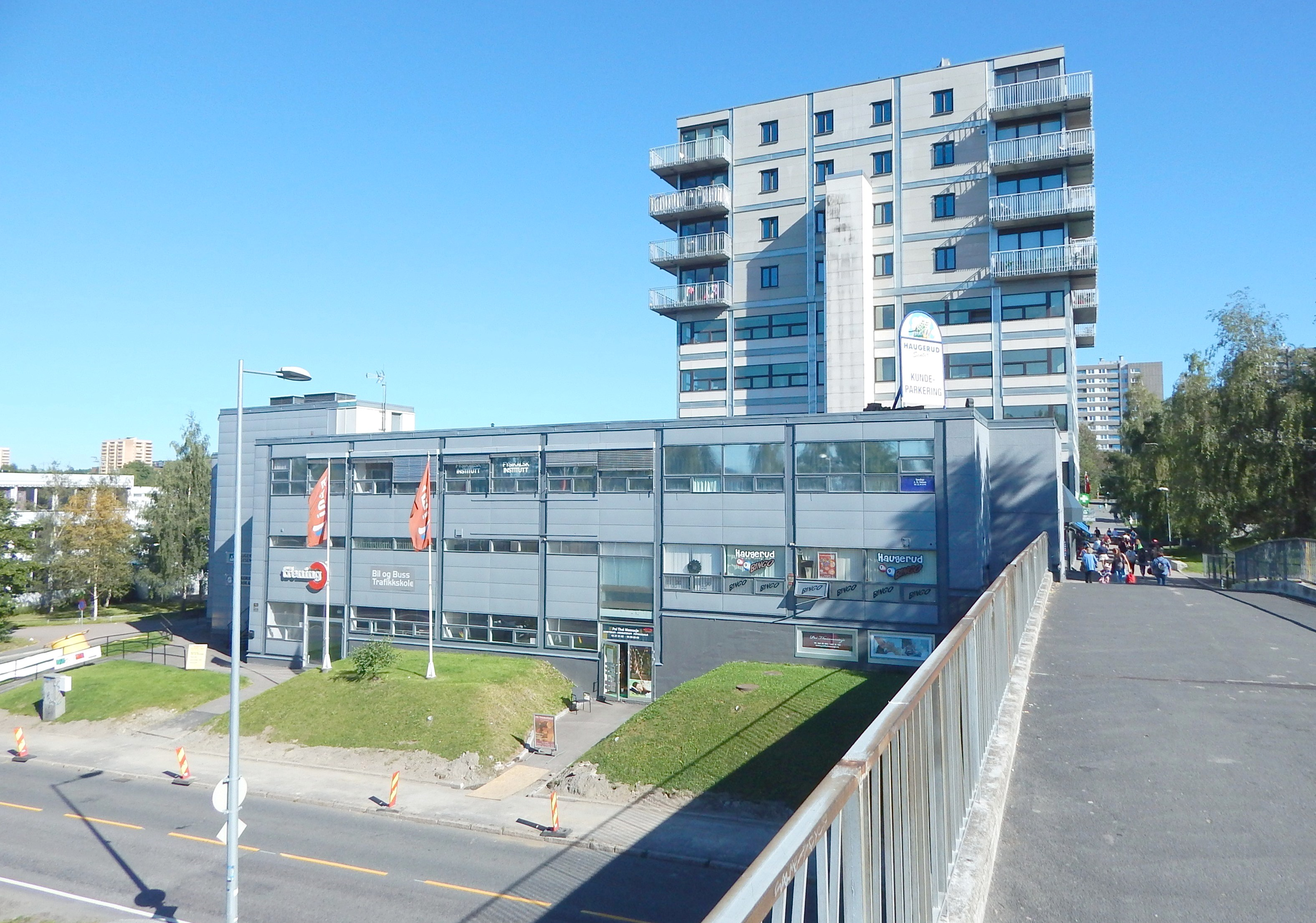 Haugerud senter sett fra T-banestasjonen. Tvetenveien går under gangbroen.